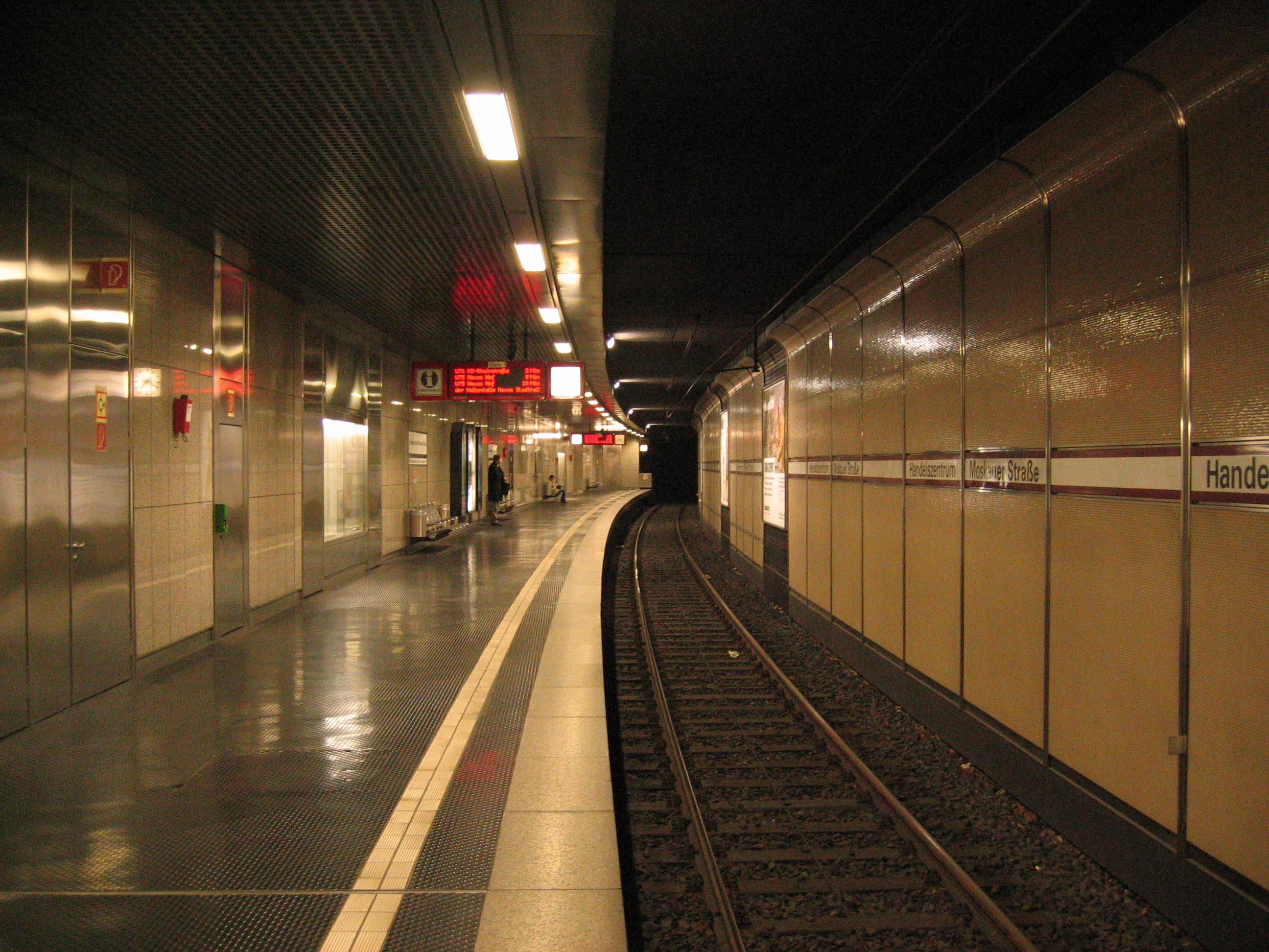 Stadtbahn Düsseldorf, U-Bahnhof Handelszentrum/Moskauer Straße